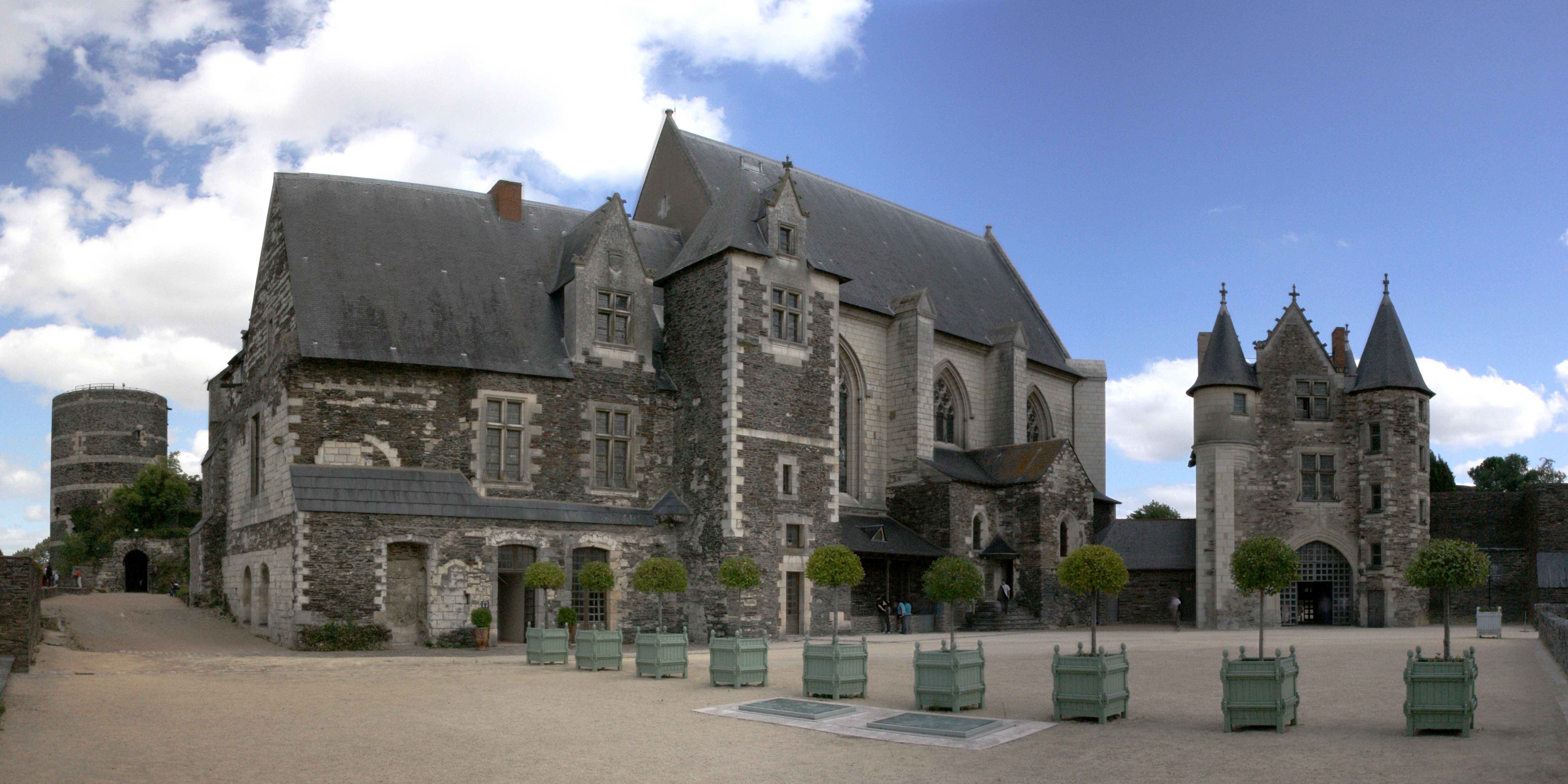 Vue générale de la haute-cour du château d'Angers, France. De gauche à droite, la tour du moulin (au fond), le logis royal, la chapelle, et le châtelet.